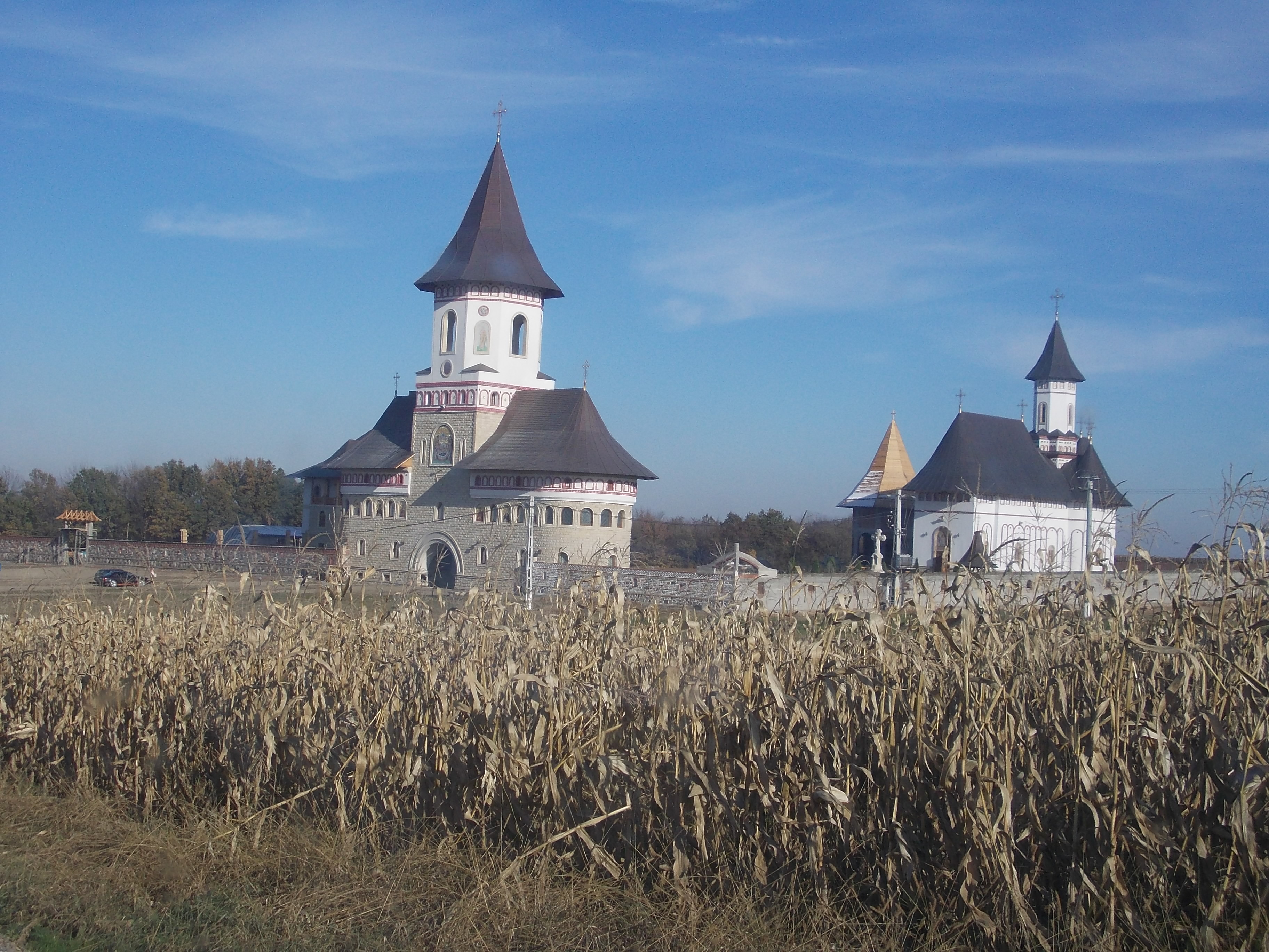 mânăstirea Zosin, Bt